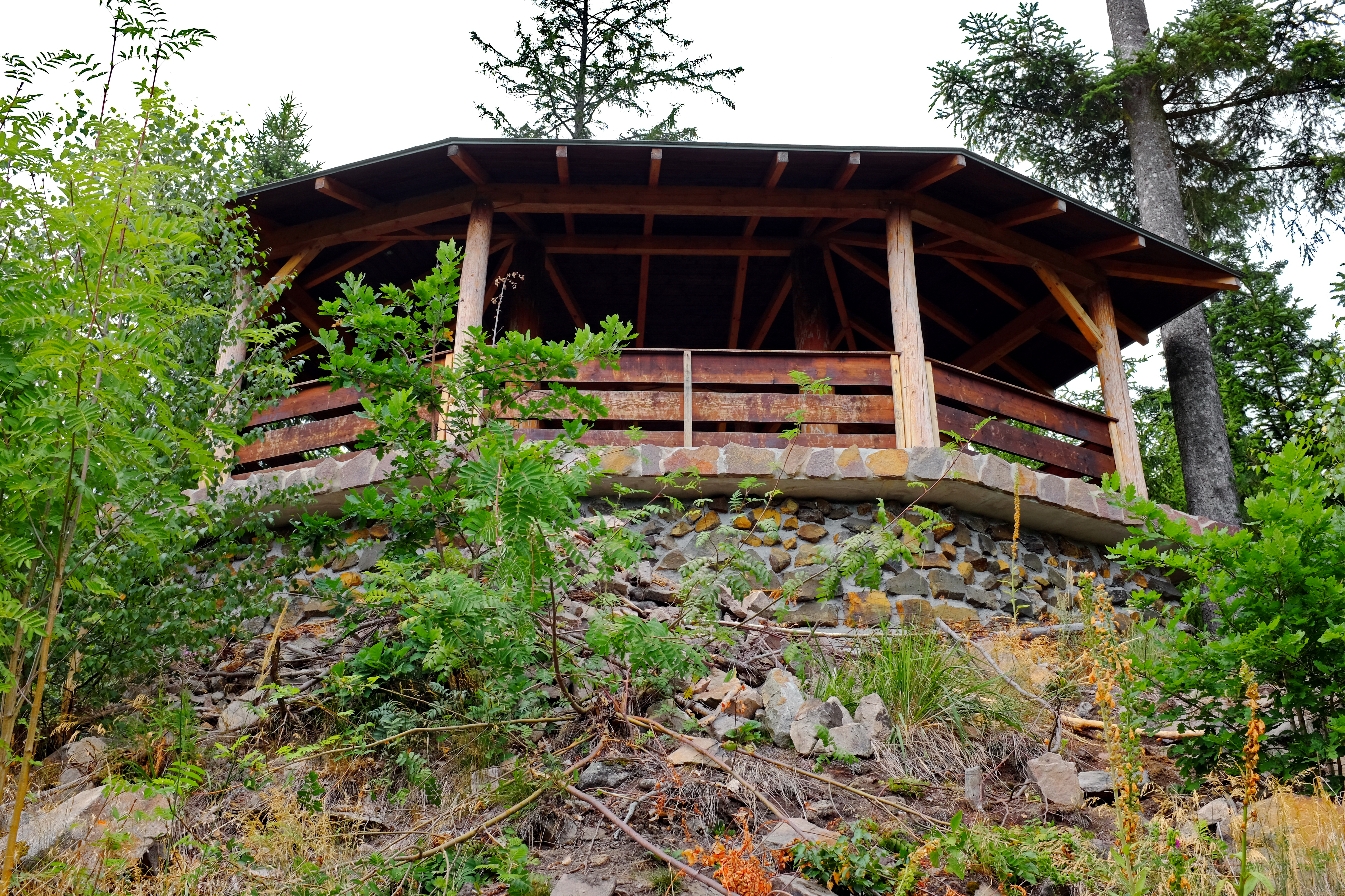 Karlovarské lázeňské lesy, Jungmannův altán, Karlovy Vary